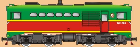 tu2-206fon